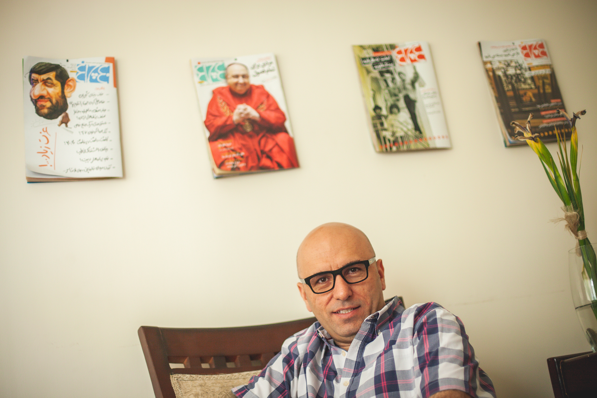 این عکس توسط پوریا افخمی در تهران ثبت شده است